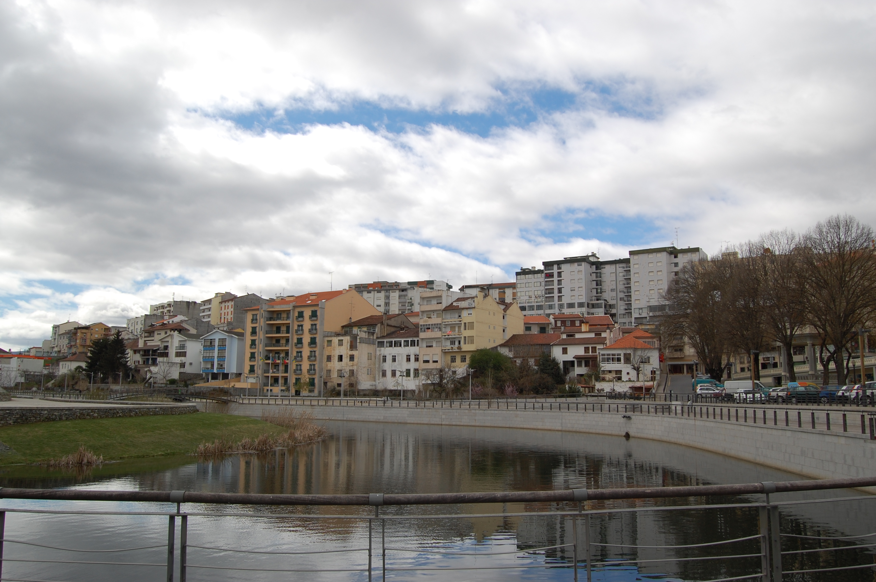 A cidade de Bragança, no nordeste de Portugal.